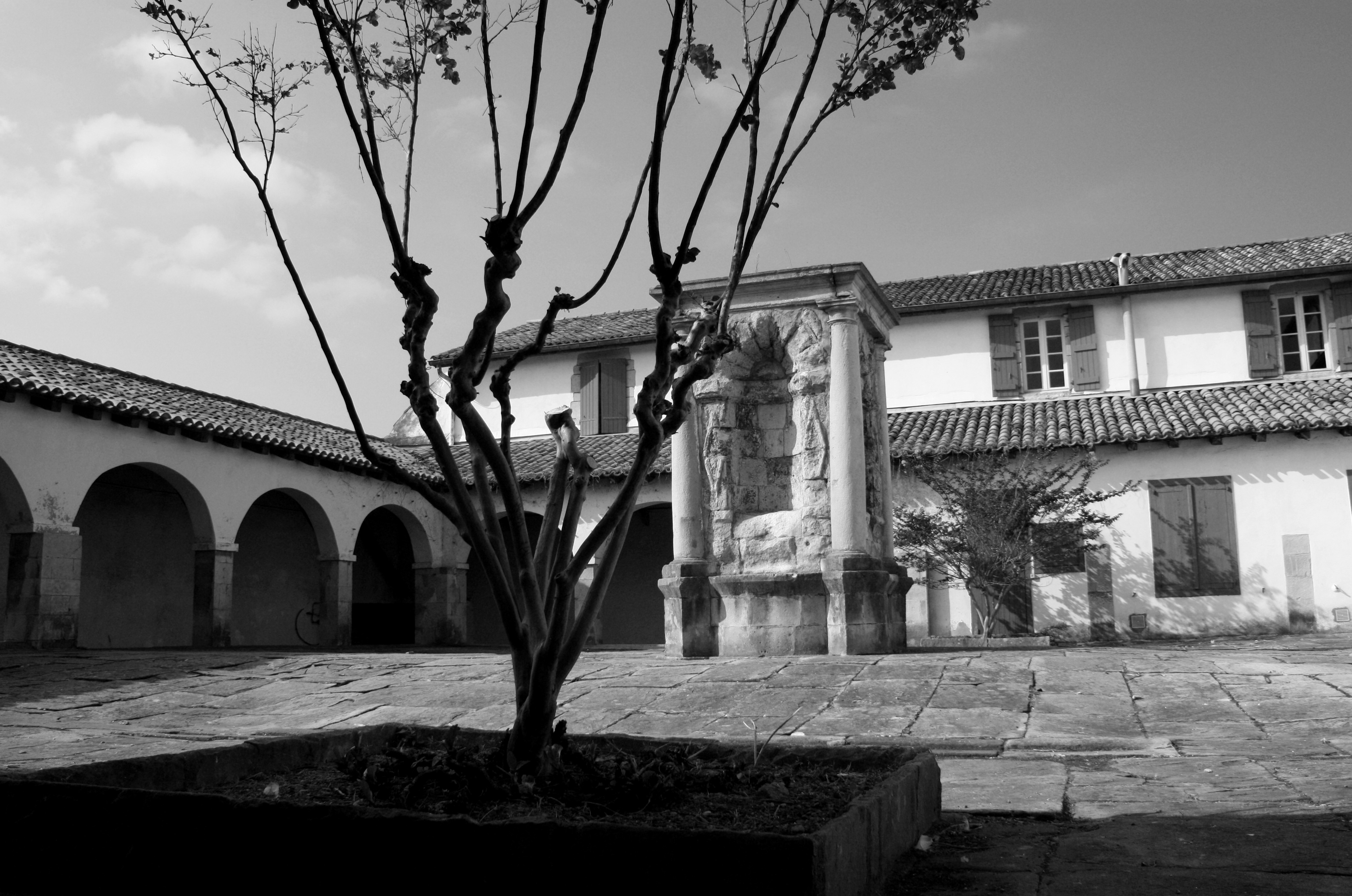 Couvent des Récollets de Cibourecloître, puits, (Inscrit, 1925) .